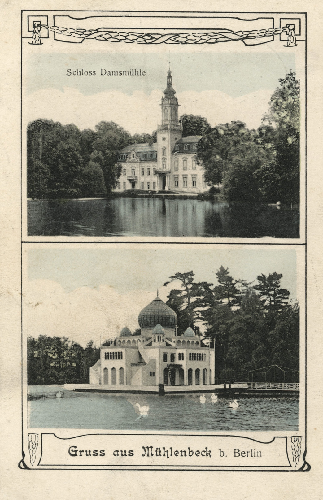 Ansichtskarte von Schloss Damsmühle und Scheinmoschee im Schlossgarten. Verschickt im Juli 1912.